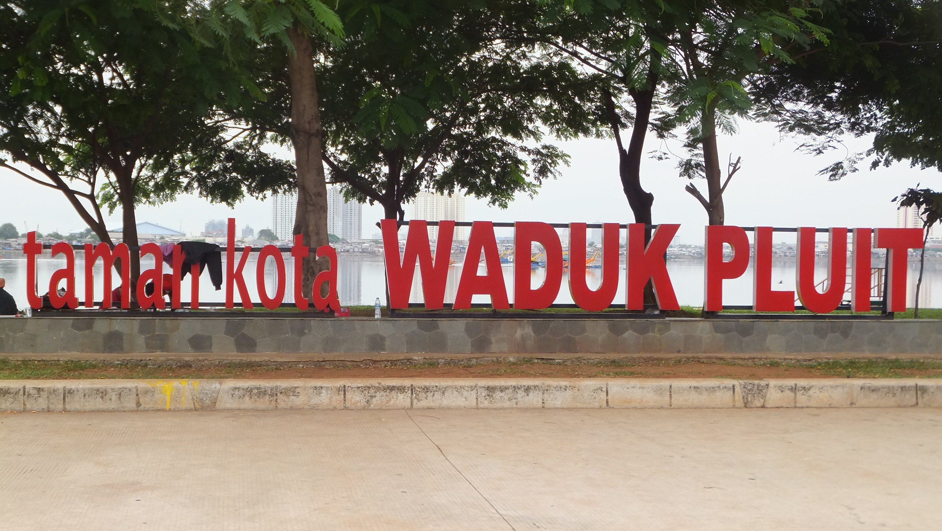 Penanda tama kota Waduk Pluit yang menjadi tujuan utama untuk berfoto bagi para pengunjung.